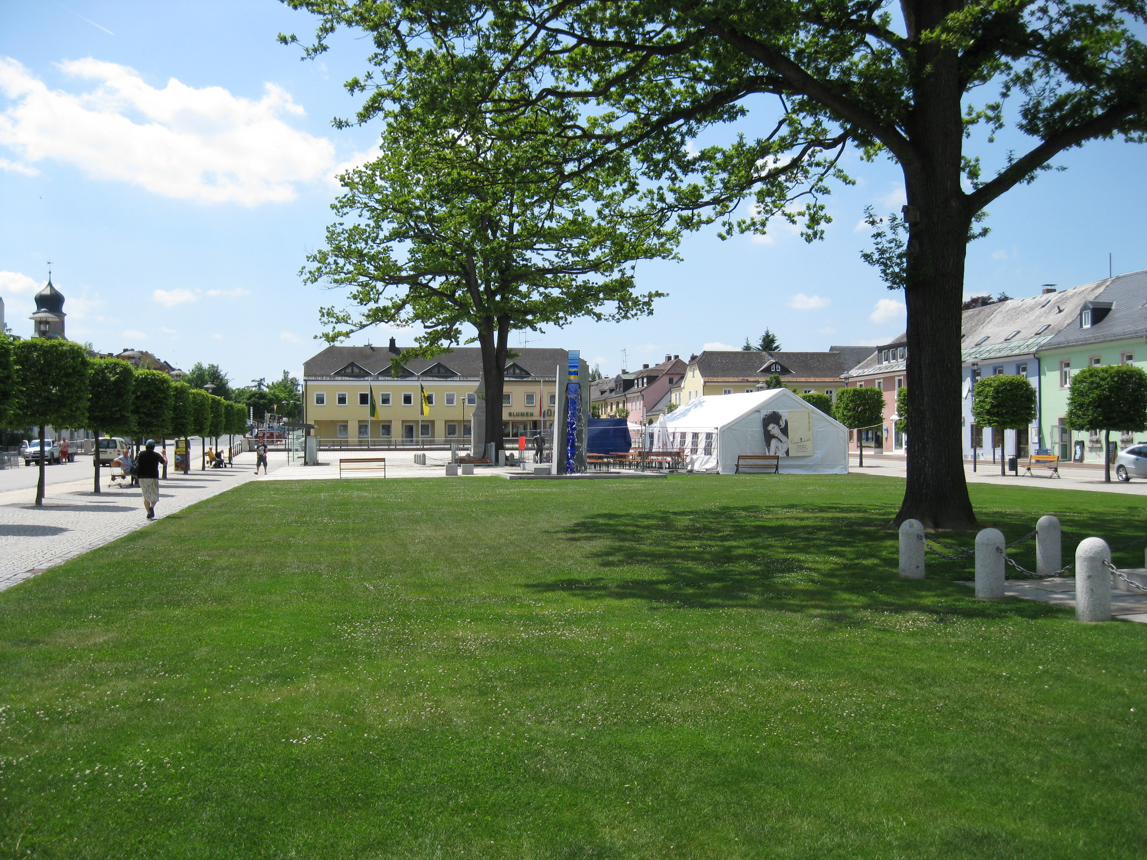 Gebäude und Plätze in Rehau